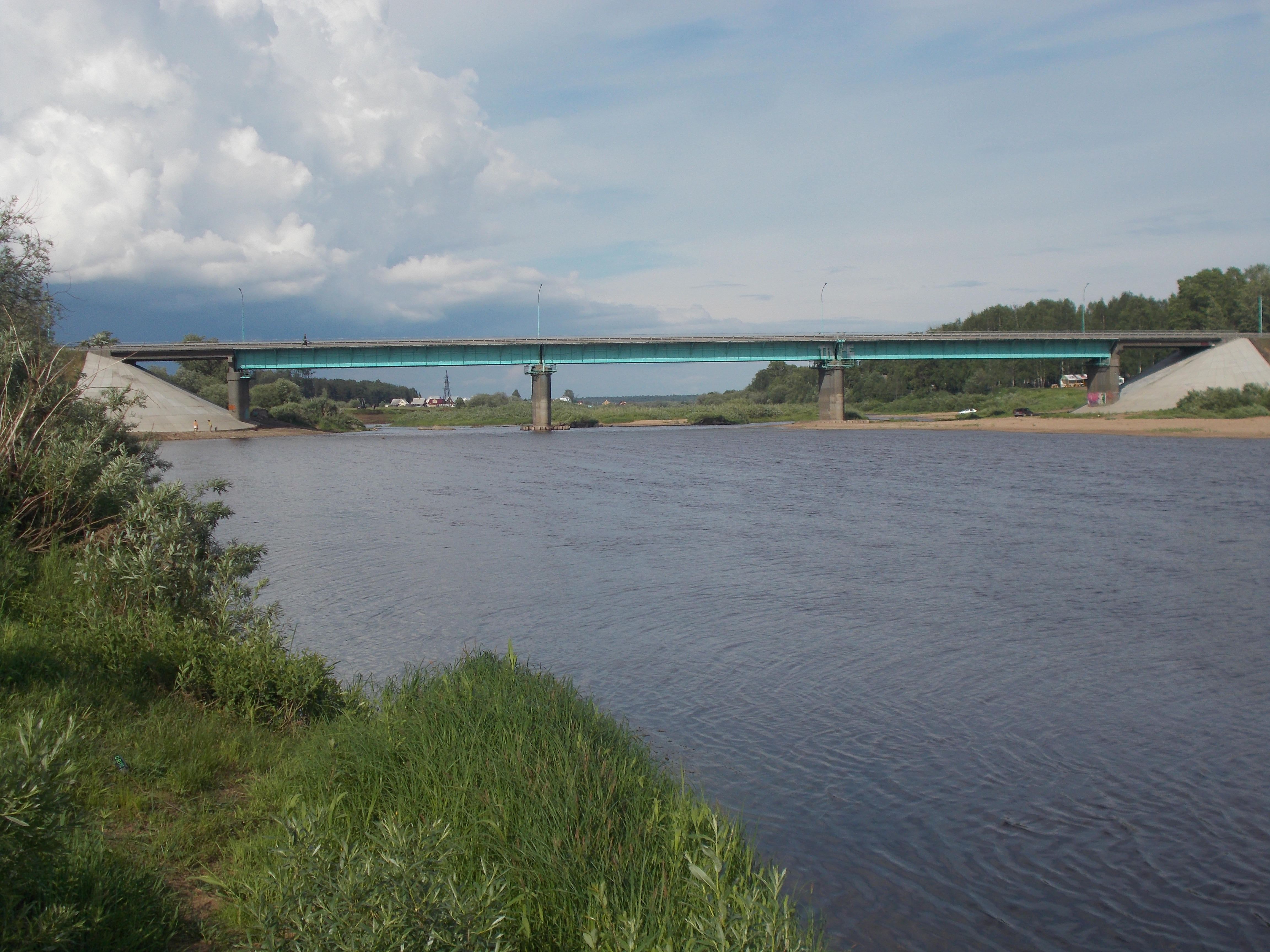 Мост через реку Вель у города Вельска